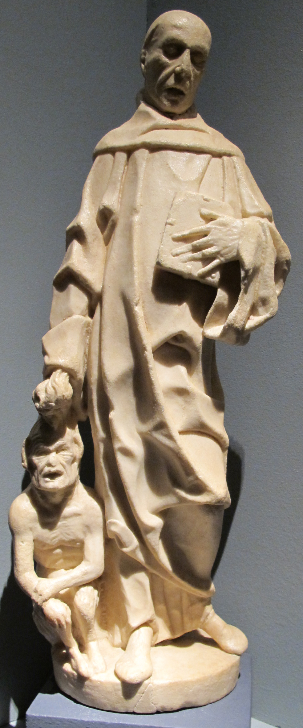 Giovanni antonio amadeo, san bernardo di chiaravalle, coll. privata